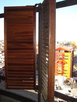 Vista de la celosía desde el interior de Torres Blancas